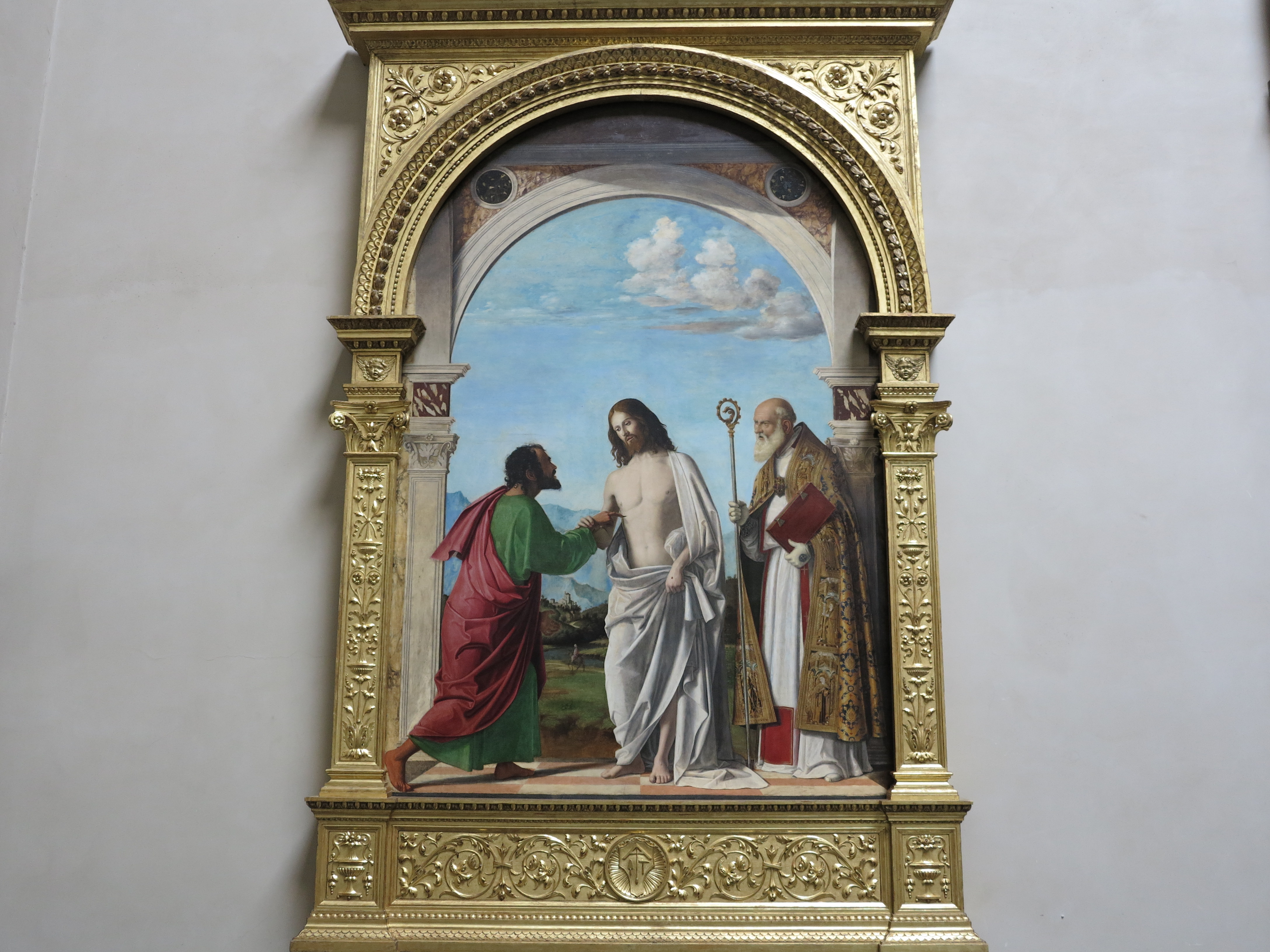 Gallerie dell'Accademia - MIBAC This is a photo of a monument which is part of cultural heritage of Italy.